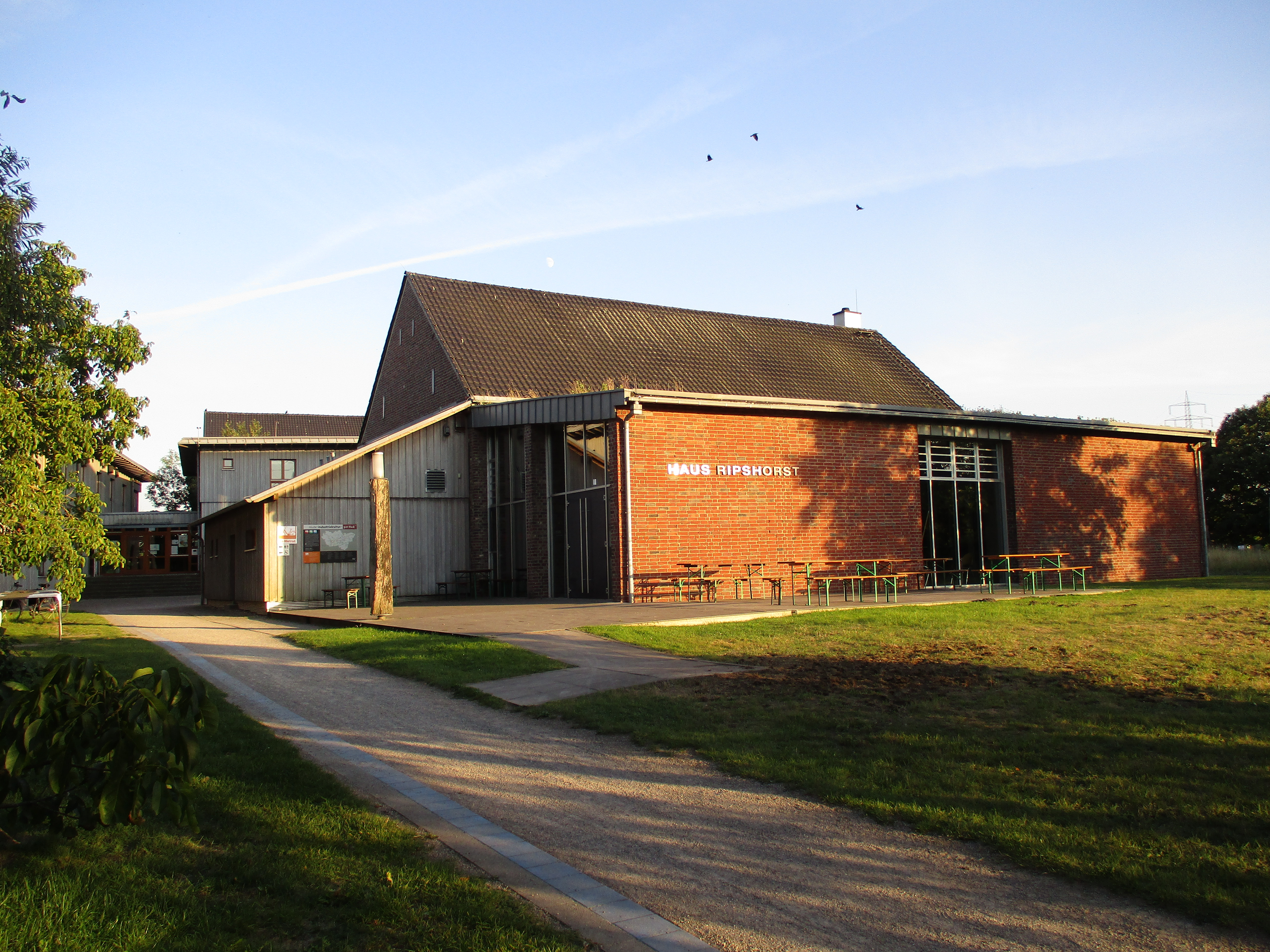 Haus Ripshorst in Oberhausen